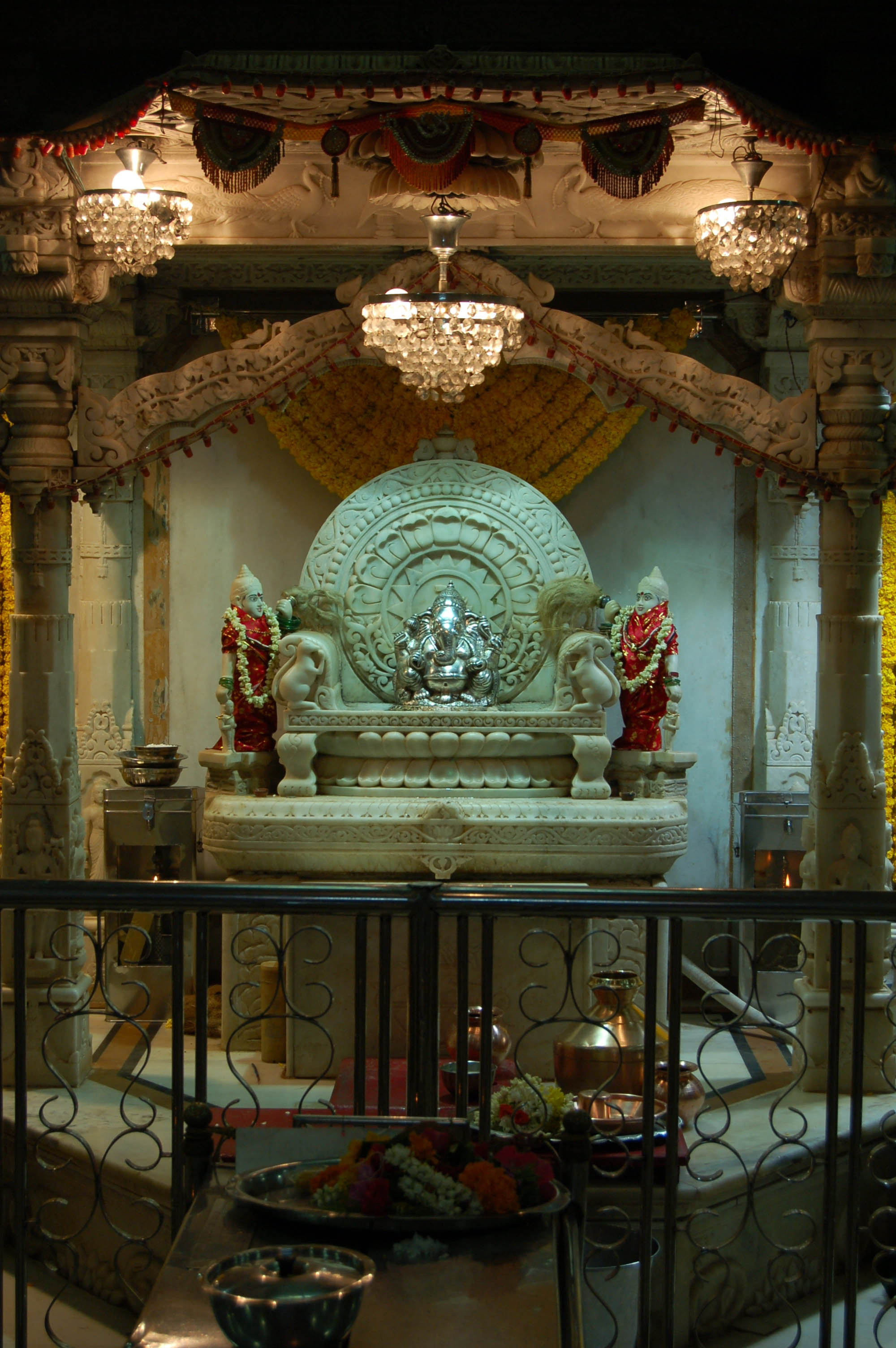 This is Udyan Ganesh Mandir near Shivaji Park, Dadar, Mumbai, Maharashtra, India.